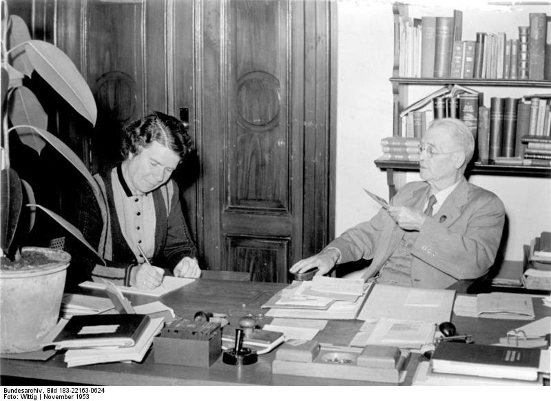 Zentralbild/TBD (Wittig) 7.11.1953 Nationalpreisträger Prof. Dr. Dr. Hermann Haack, Gotha Der 81-jährige Prof. Dr. Dr. Hermann Haack erhielt am 7.10.1953 für seine verdienstvolle Tätigkeit als Karthopraph den Nationalpreis. Er ist noch heute Mitarbeiter aller auf seinem Gebiet erscheinenden Zeitschriften sowie Herausgeber und verantwortlicher Redakteur der international bekannten Fachzeitschrift "Petermanns Geographische Monatsschrift."- Prof. Haack ist einer der ältesten Freunde der Sowjetunion. Selbst in den Jahren des Hitlerregimes veröffentlichte er stets bei seinen wissenschaftlichen Zeitungen Aufsätze aus sowjetischer Feder. Seit 1933 ist er Ehrenmitglied der geographischen Gesellschaft der Sowjetunion und seit 1951 Mitherausgeber der Zeitschrift " Sowjetwissenschaft". Er ist der Gründer der Gesellschaft für Deutsch-Sowjetische Freundschaft. UBz: Nationalpreistäger Prof. Dr. Dr. Hermann Haack beantwortet mit seiner Sekretärin, Kollegin Goetsch, die aus allen Ländern der Erde eingehende Post.